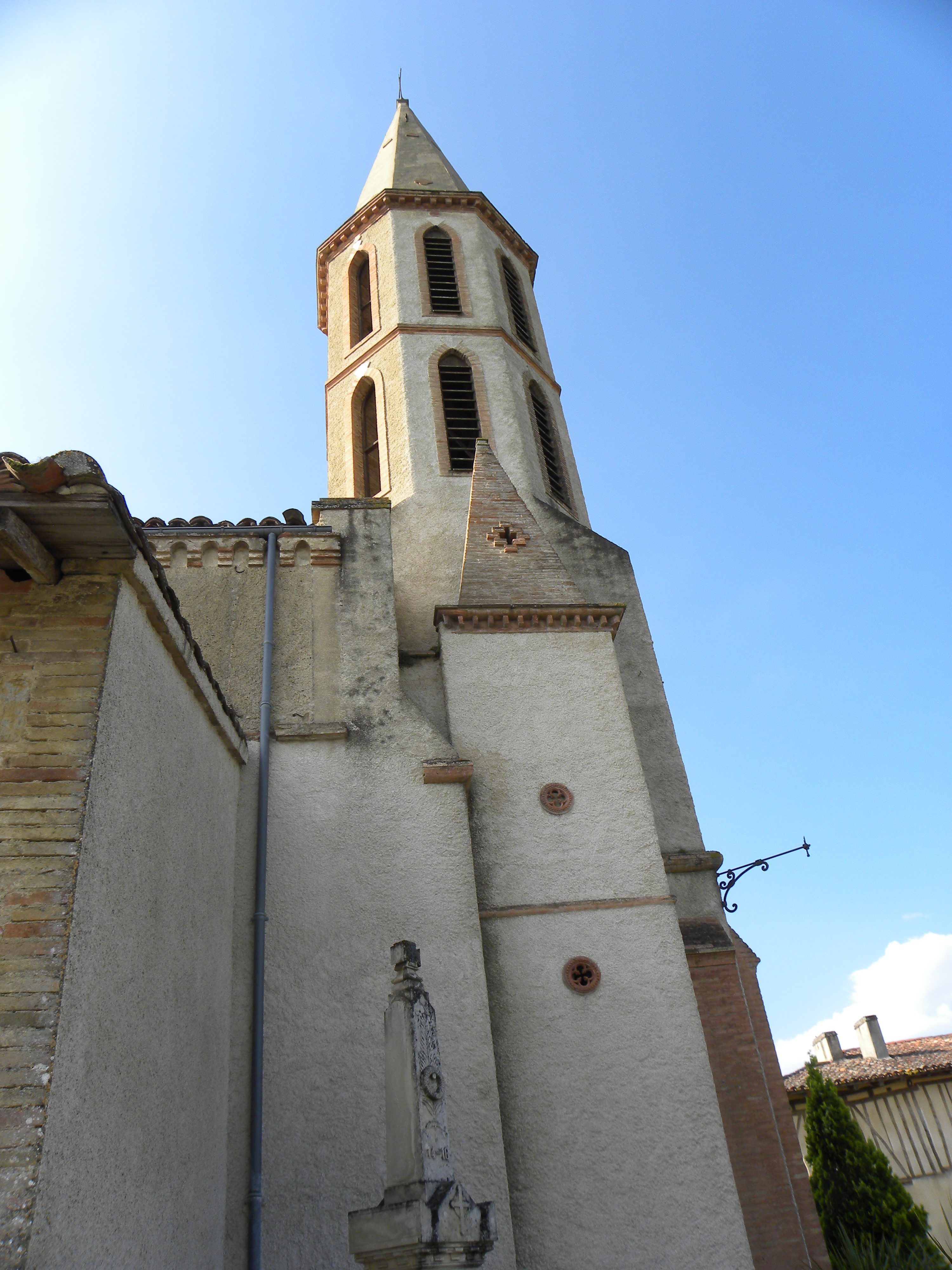 Eglise Sainte-Quitterie de Marestaing